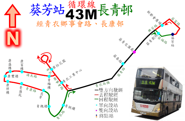 中文（香港）: 九巴43M線的走線圖